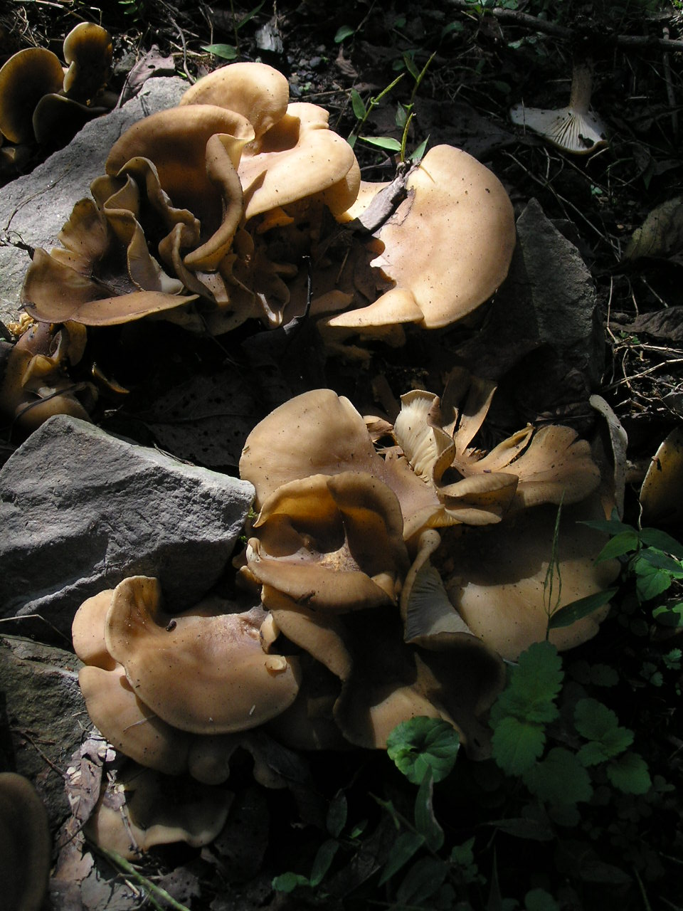 ハタケシメジ（Lyophyllum decastes）//（キシメジ科 シメジ属）～～【おぉたむ すねィく探検隊】写真・きのこ部門 担当 勅使河原 賢明 ～photo by Autumn Snake